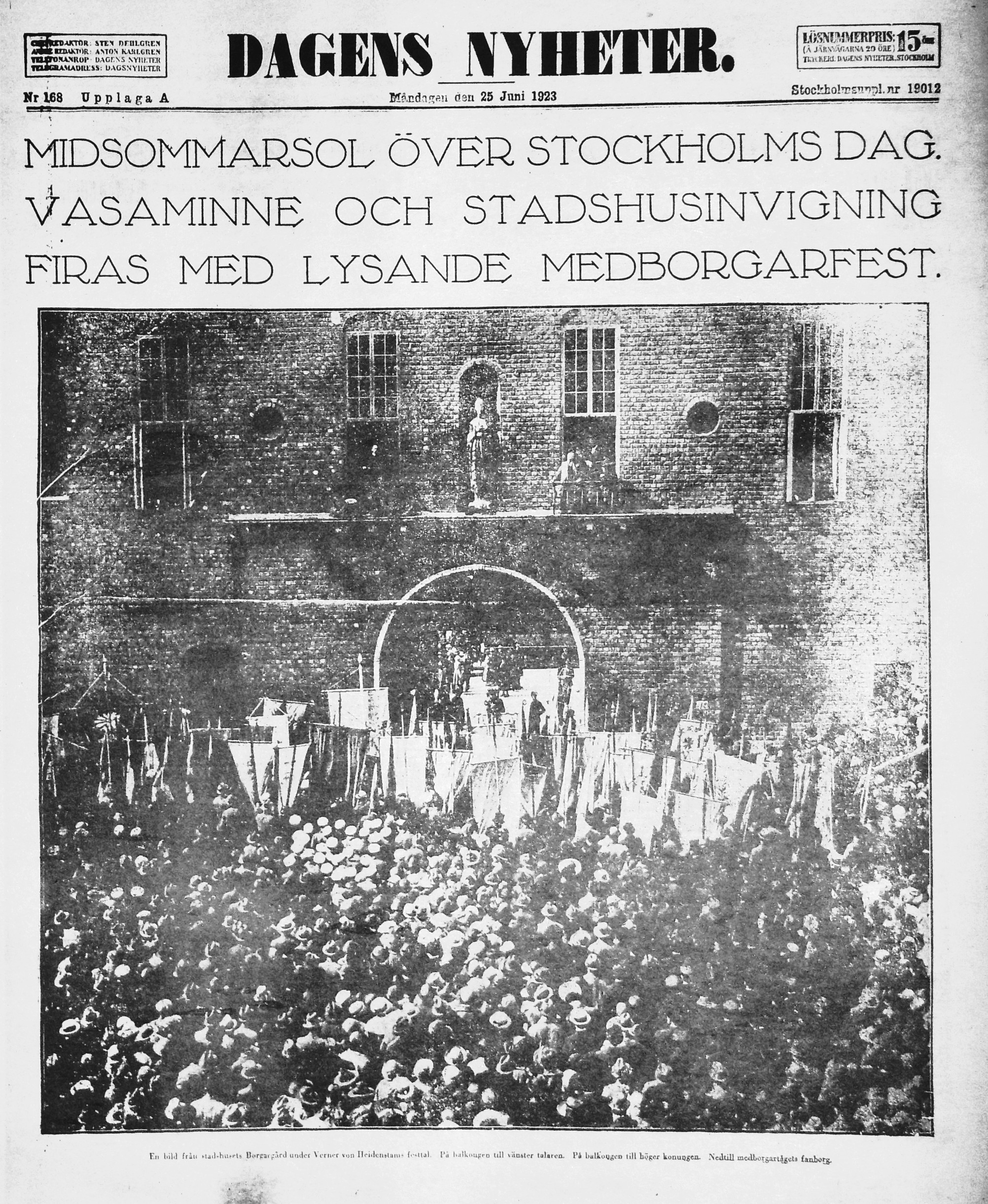 Dagens Nyheter första sida 25 juni 1923 (Invigning av Stockholms stadshus)